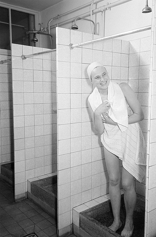 Original image description from the Deutsche Fotothek Portrait einer Frau mit Handtuch und Badehaube im Baderaum der Leipziger Volkszeitung